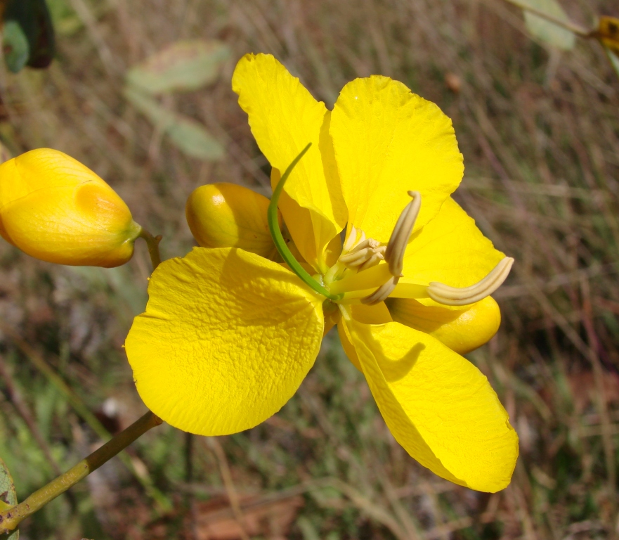 Senna pendula var. glabrata (Vogel) H.S. Irwin & Barneby - FABACEAE - Parque Estadual do Biribiri - Serra do Espinhaço - Diamantina - Minas Gerais - Brasil.